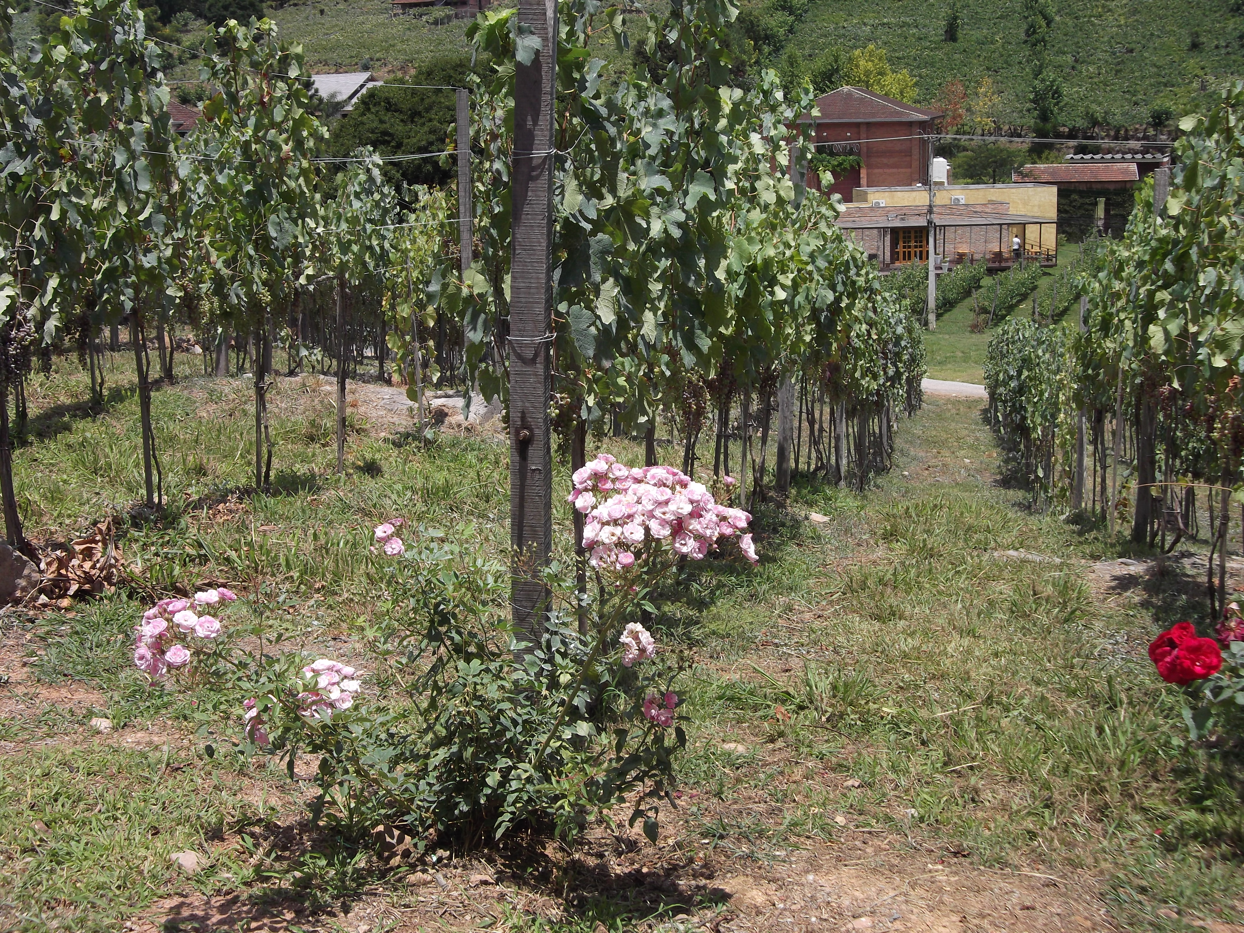 Vinhas da Vinícola Torcello (Bento Gonçalves, Brasil) : A roseíra serve como indicativo ataque de pragas.